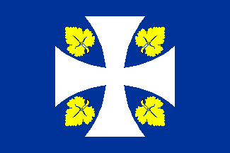 Bandera de Ribas de Sil, en Lugo (España)